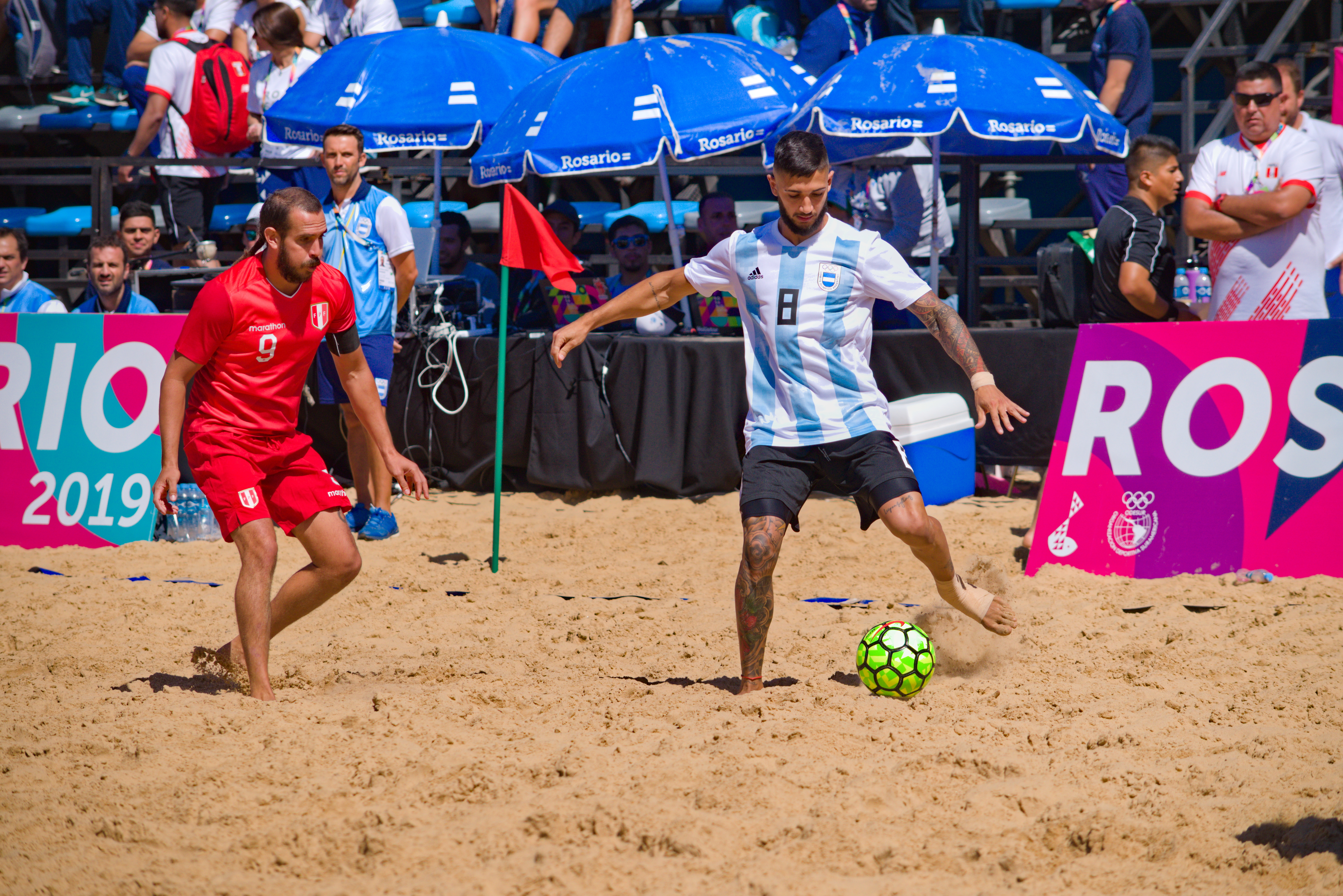 Partido clasificatorio masculino de football entre Argentina y Perú en los Juegos Suramericanos de Playa 2019